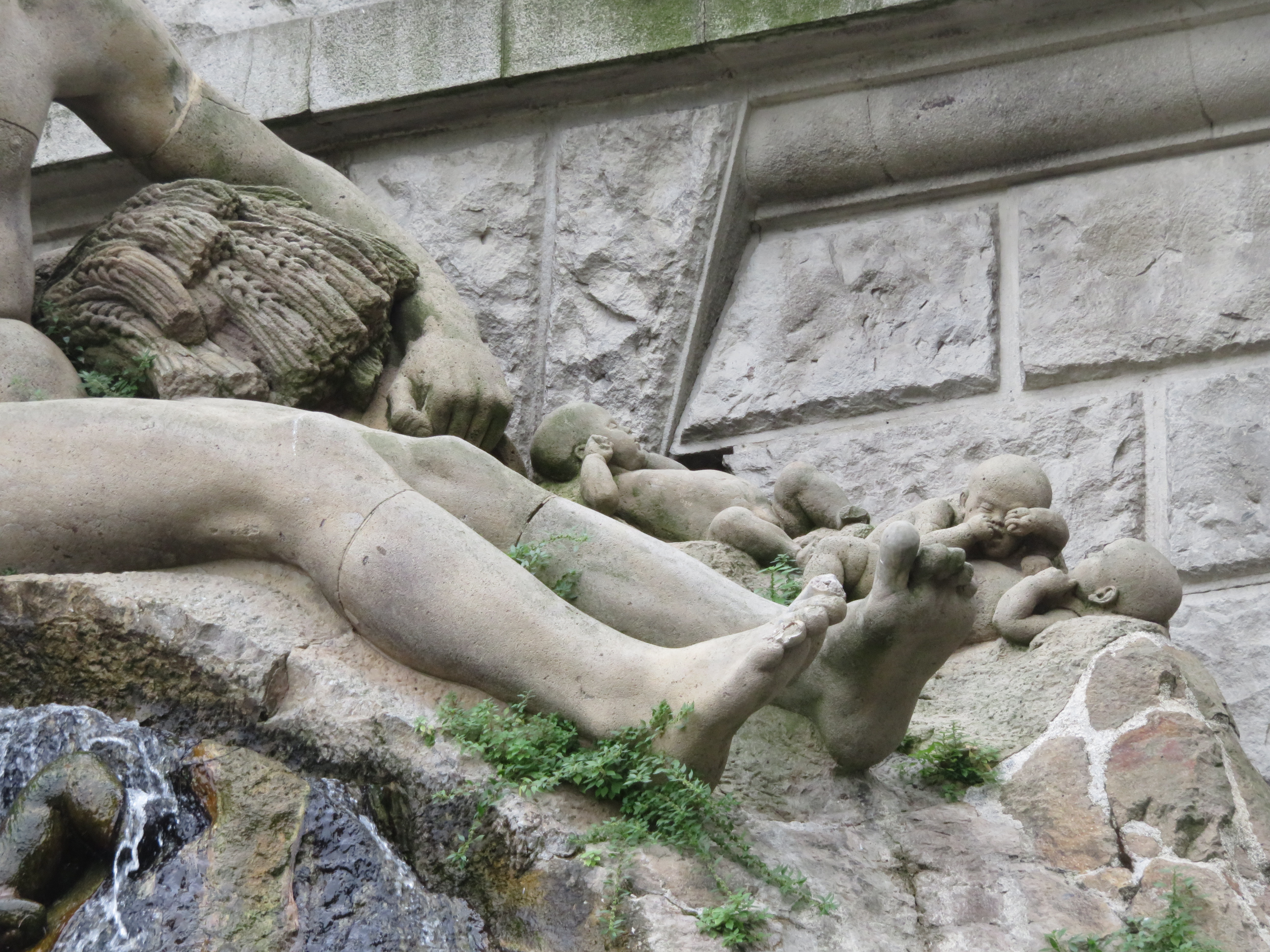 Il Po e i suoi affluenti. Fontana realizzata in cemento armato da Arrigo Minerbi per l'acquedotto monumentale di Ferrara in piazza XXIV Maggio. Particolare.